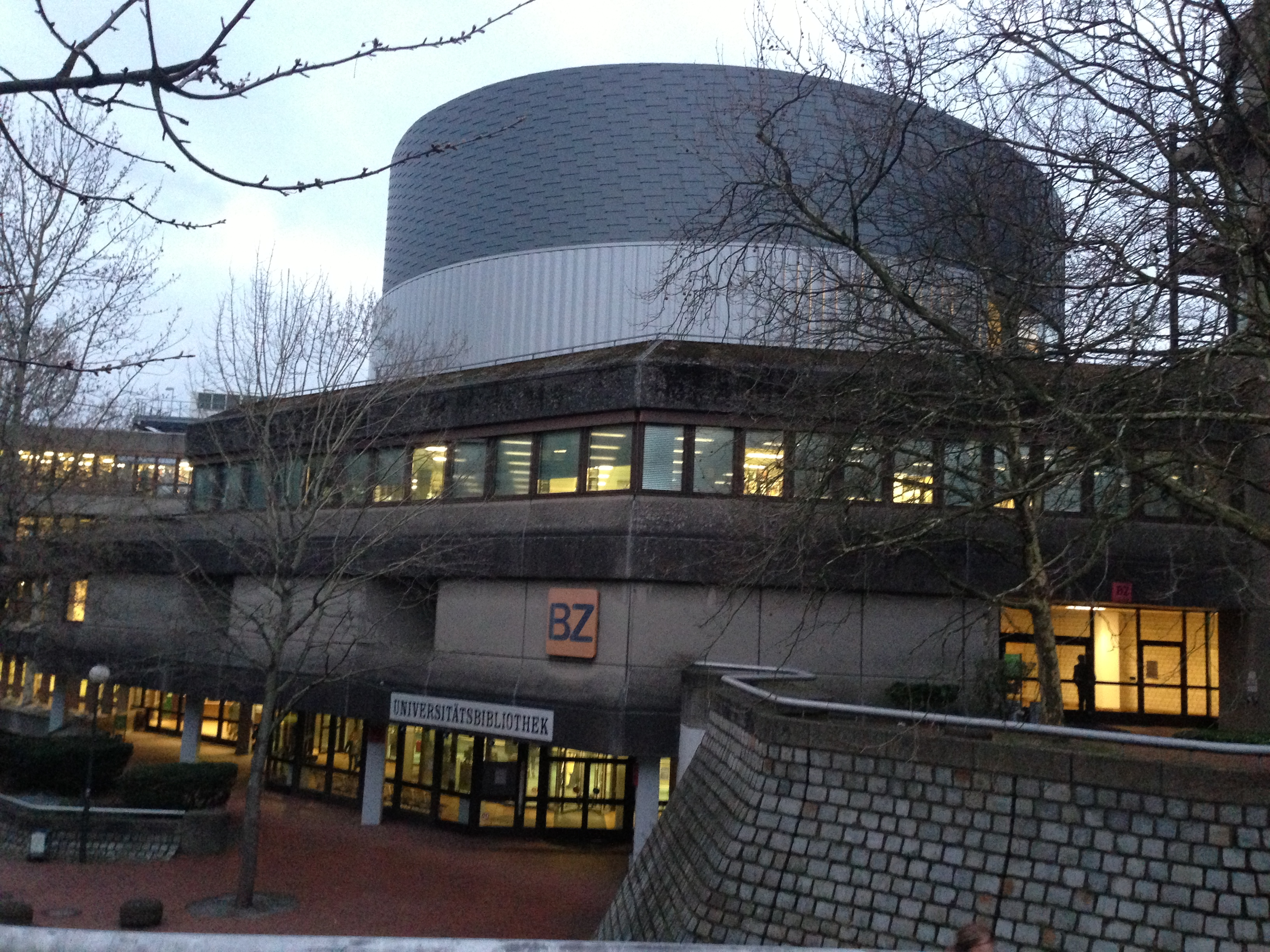 Frontseite und Haupteingang der Universitätsbibliothek Wuppertal